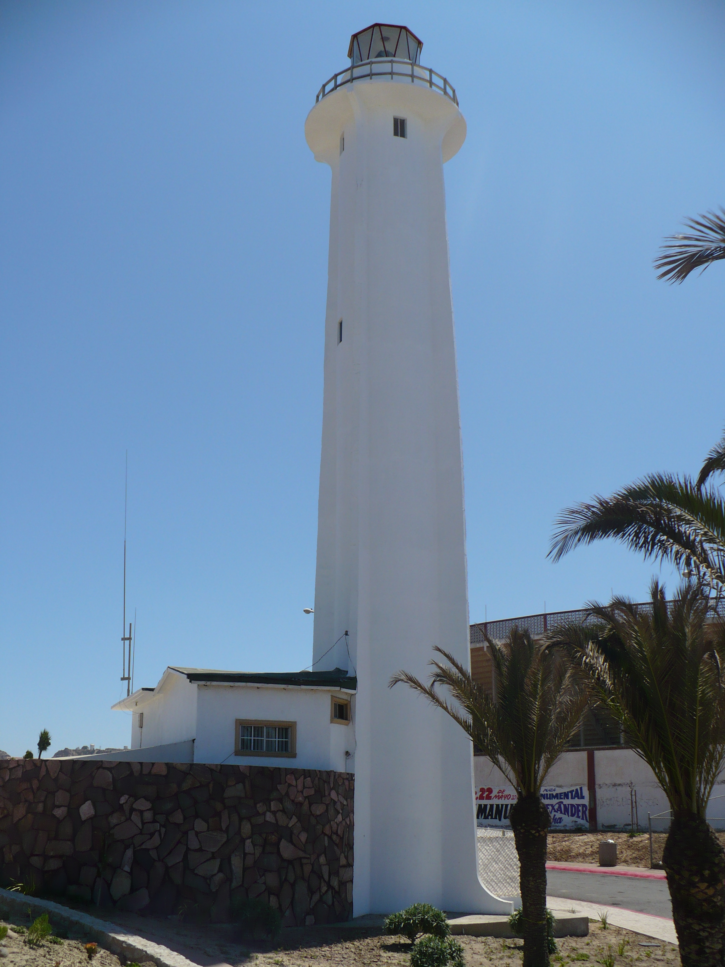 El faro en Playas de Tijuana, cerca de la frontera con EE.UU.